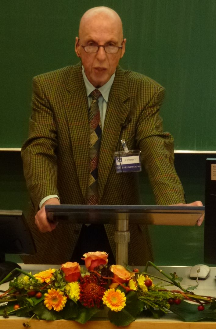 Prof. Dr. Michael M. Kochen während der Hufeland Lecture an der Universität Jena